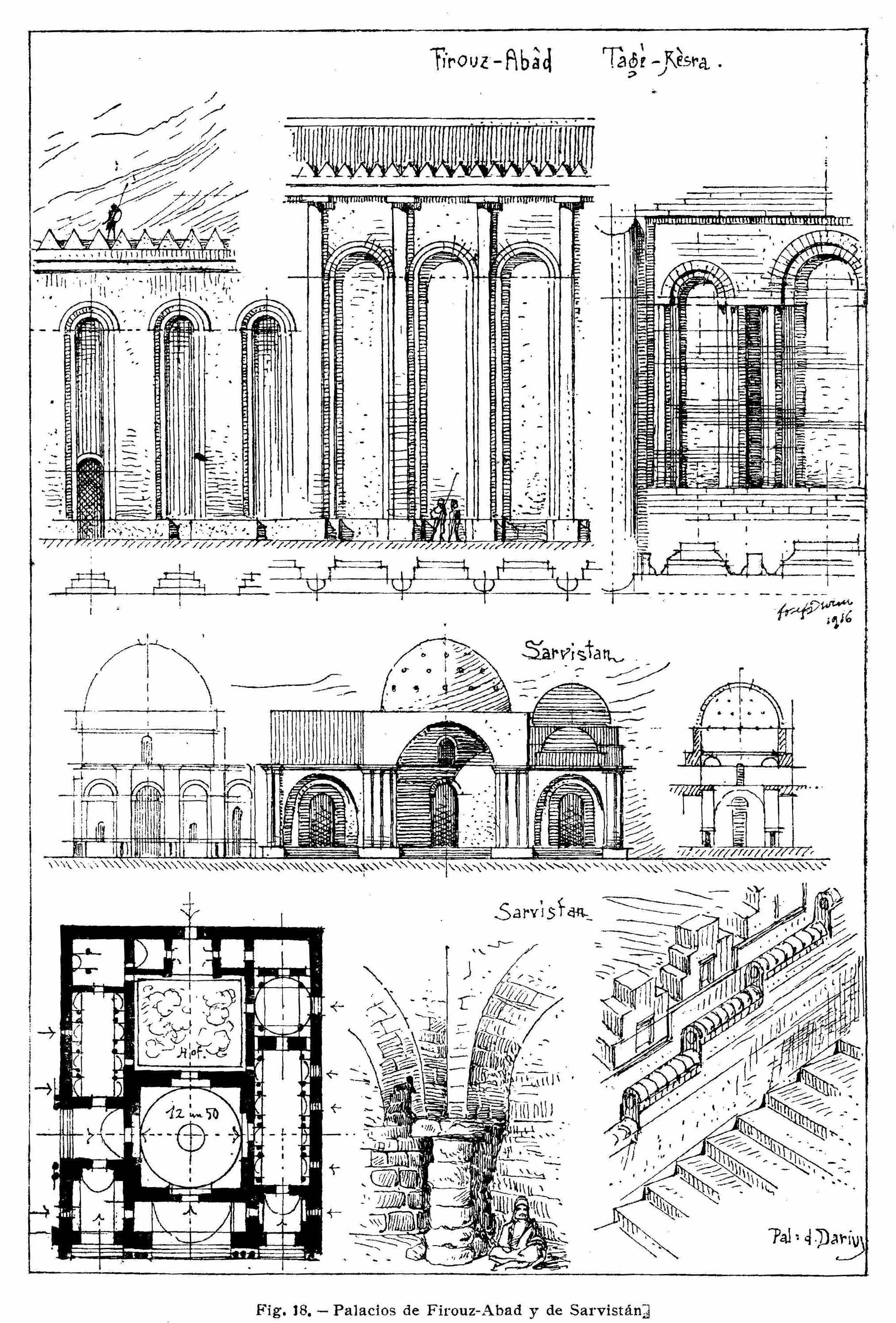 Palacios de Firouz-Abad y Sarvistán (textos del dibujo en español)